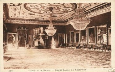 Palais du Bardo - Grand salon de réception, Le Bardo, Tunisie